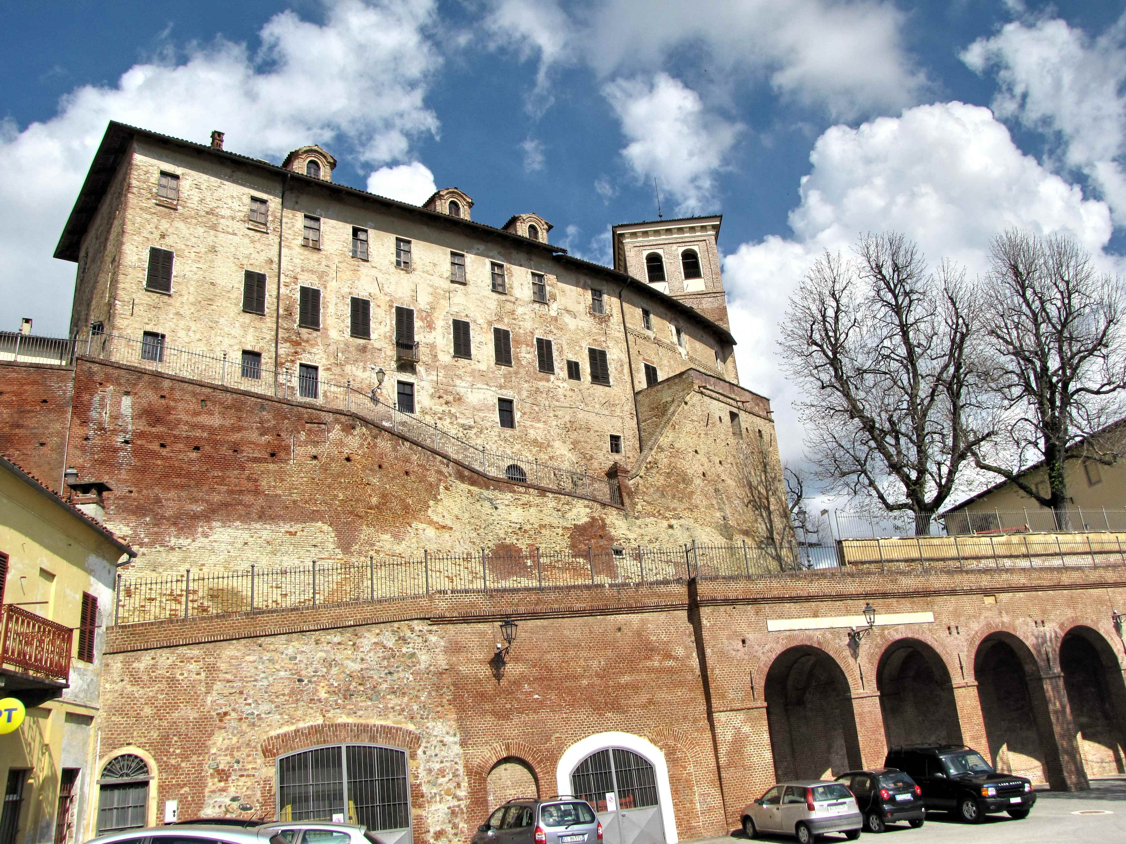 Castello di Moncucco This is a photo of a monument which is part of cultural heritage of Italy.